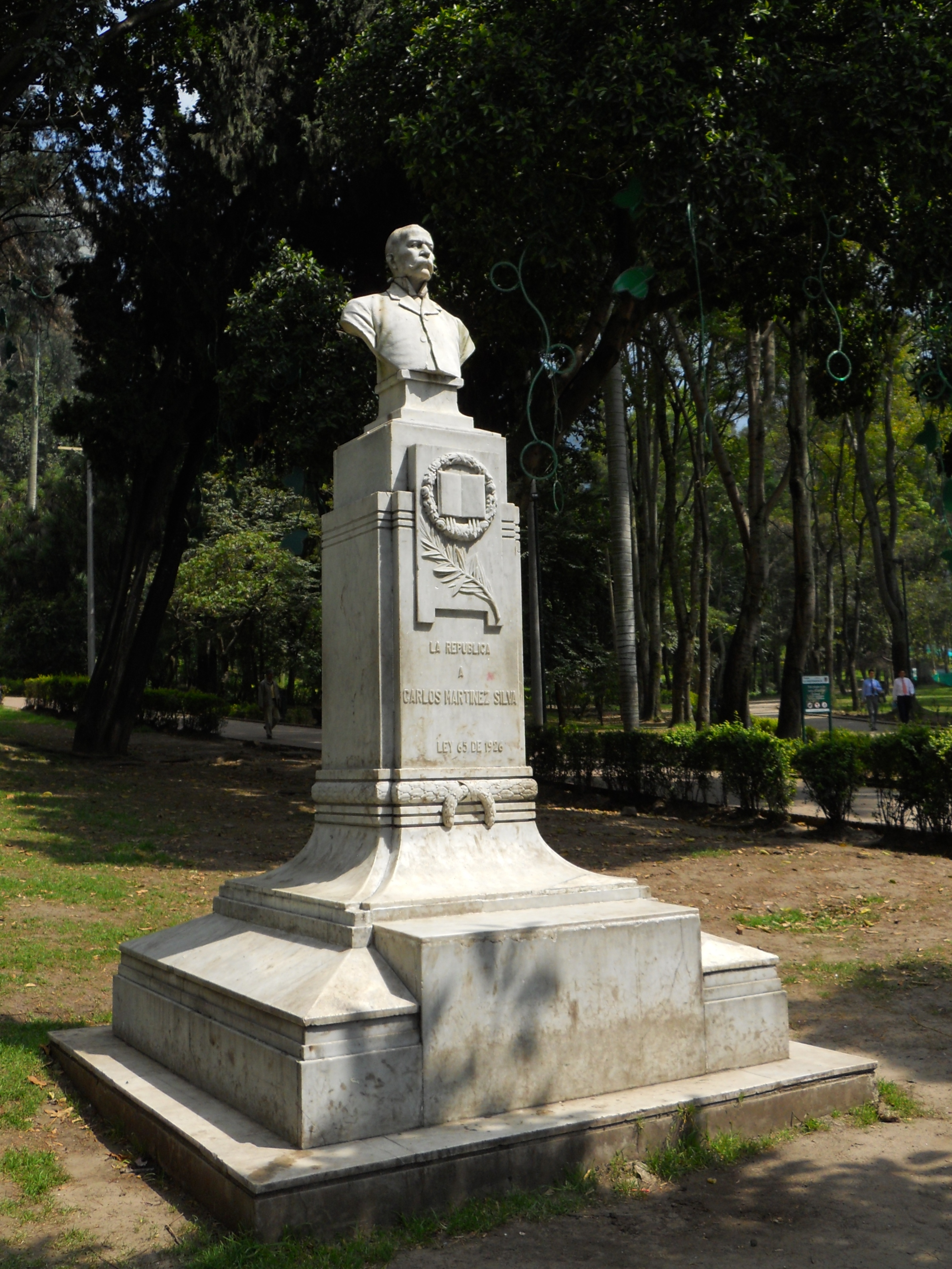 Bogotá. Monumento a Carlos Martinez Silva en el Parque de la Independencia.